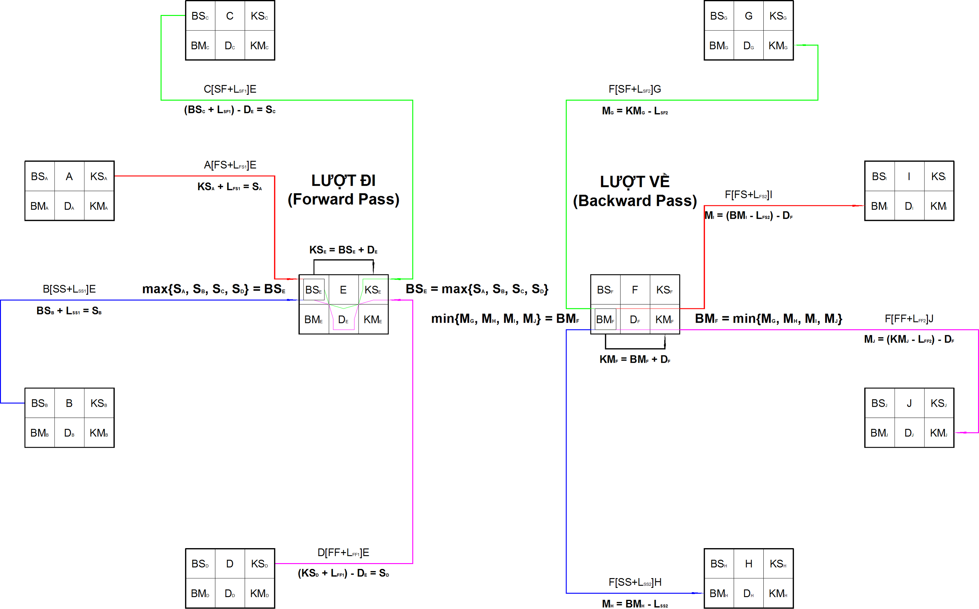 Cách tính sơ đồ mạng nút quan hệ PDM (Precedence Diagram Method).